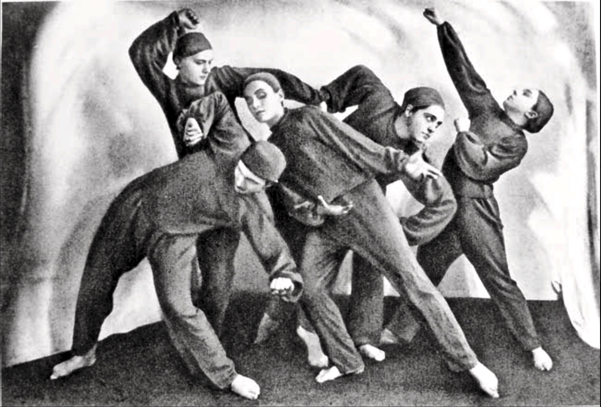 Performance-Gruppe der Jutta-Klamt-Schule, Berlin. In: John Schikowski: Geschichte des Tanzes, Berlin 1926